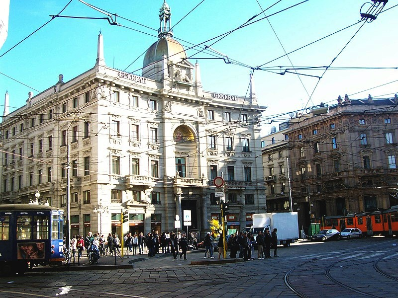 Piazzale Cordusio a Milano.